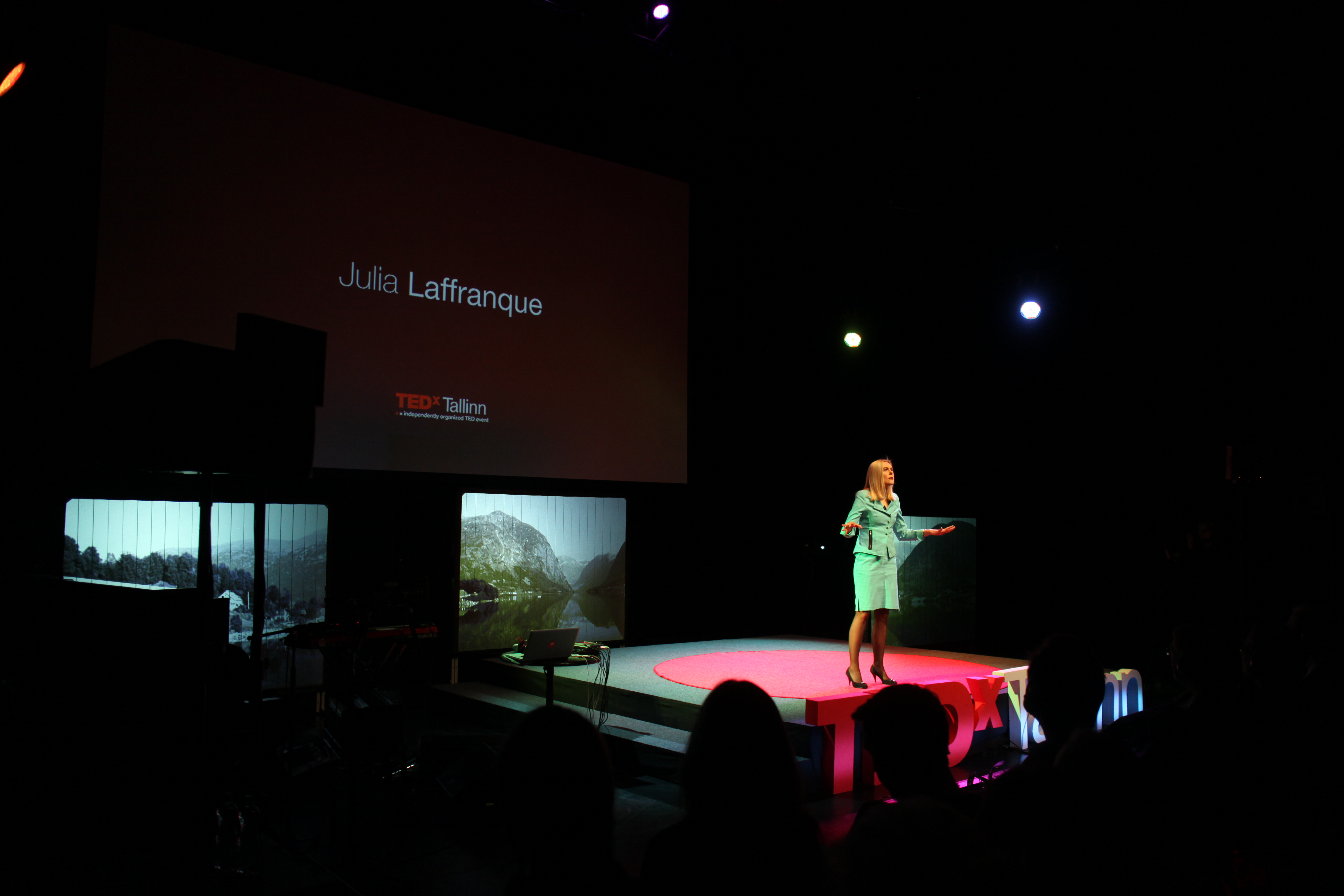 Julia Laffranque esinemas TEDxTallinn konverentsil 2012. aastal.